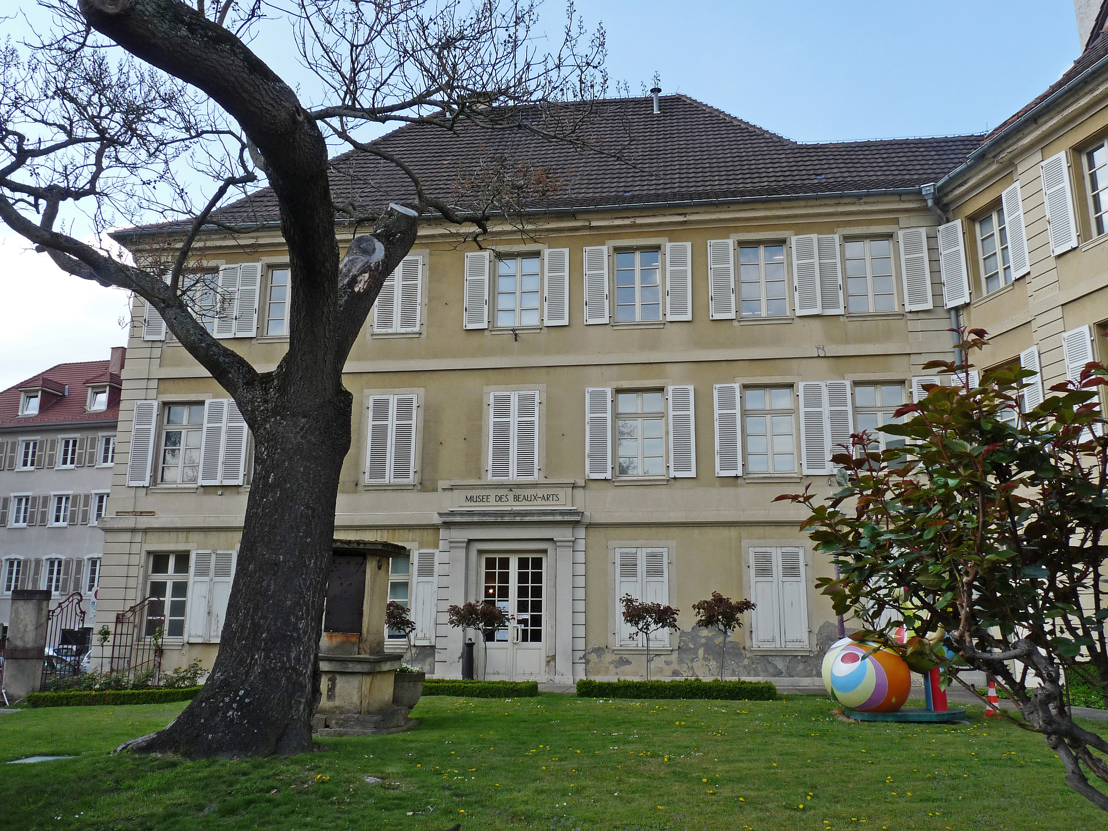 Musée des beaux-arts de Mulhouse, dans la Villa Steinbach